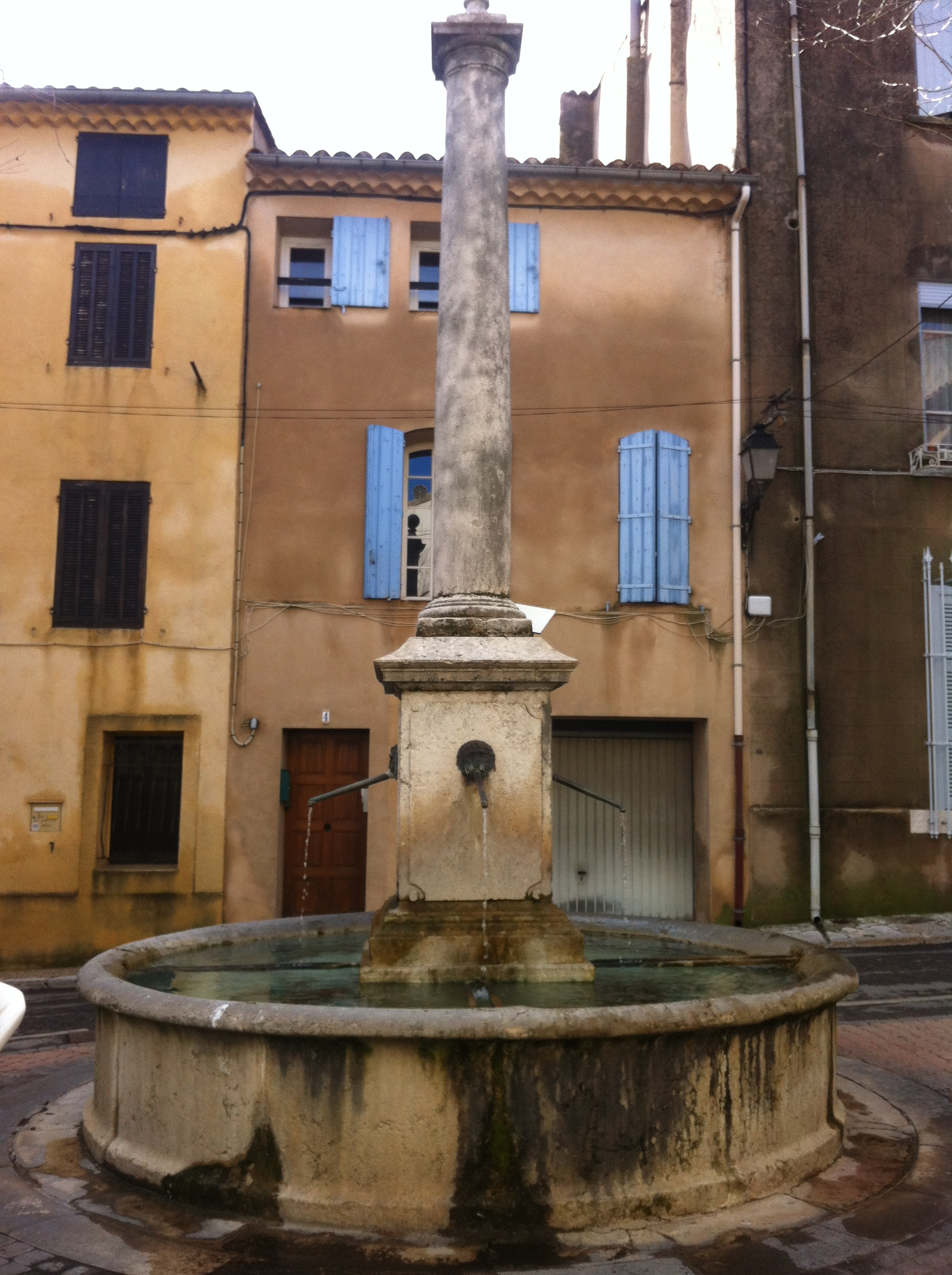 fontaine